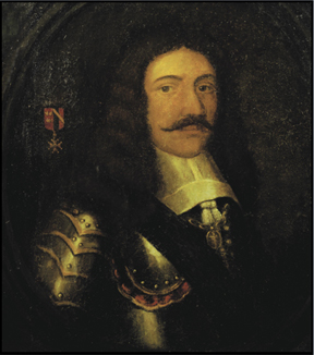 Portrait de Gilles de la Roche-Saint-André, (1621-1668) chef d'escadre de la Marine royale sous Louis XIII et Louis XIV, représenté avec l'Ordre du Christ qui lui a remis le roi de Portugal en 1650.